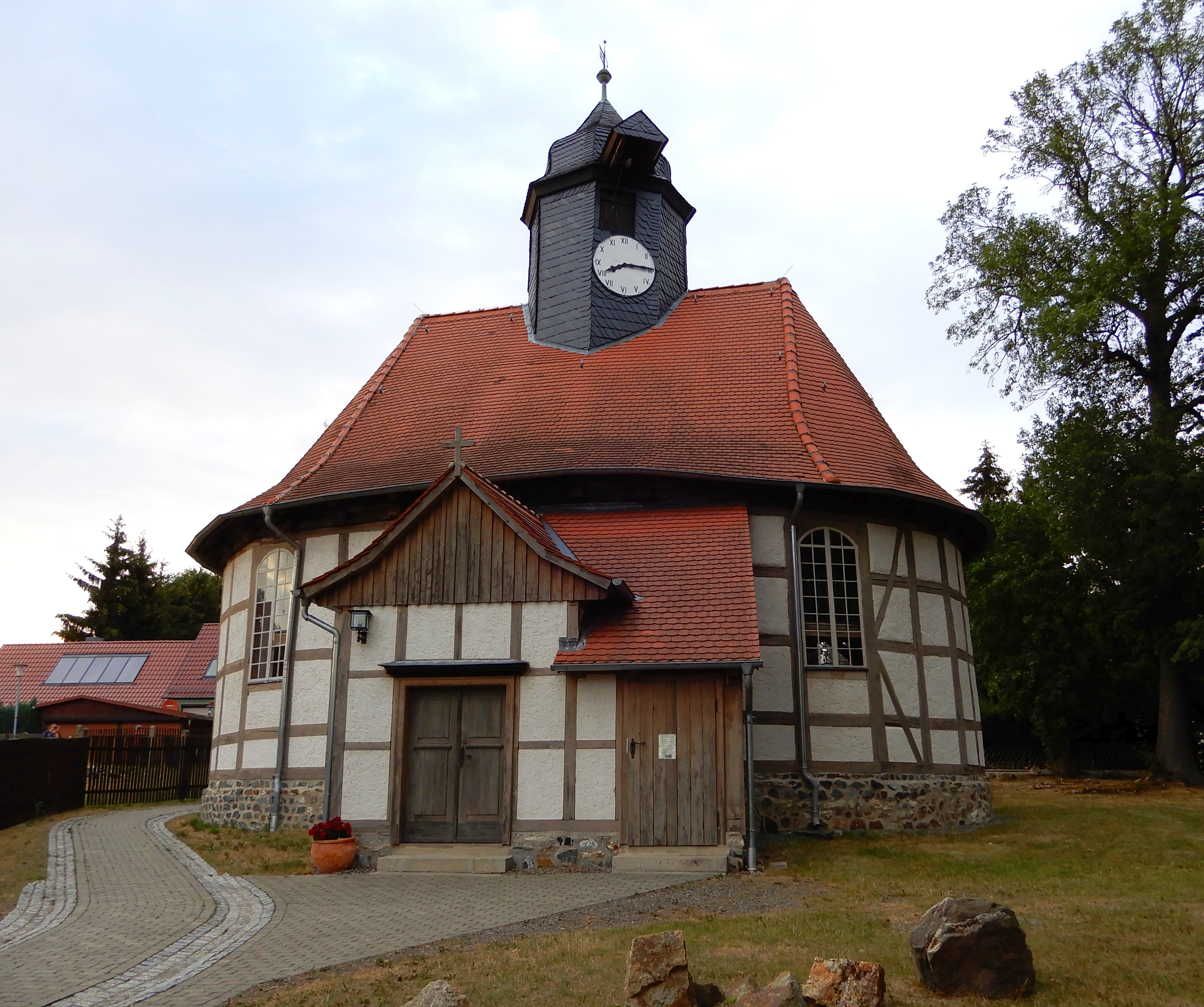 Fachwerk-Kirche St. Paulus Siptenfelde 1682-1685